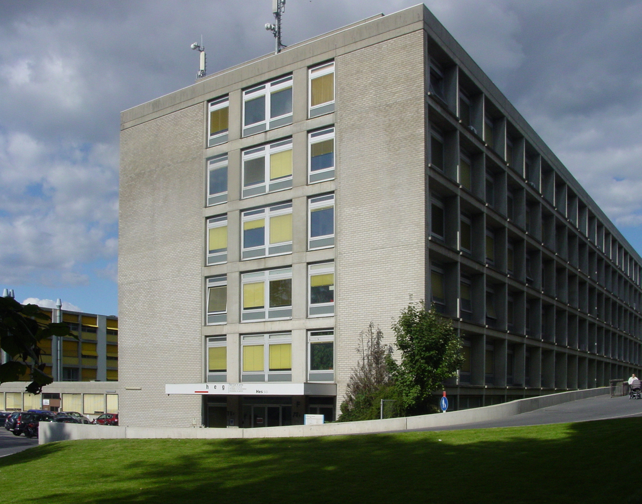 Bâtiment F der Haute école de gestion